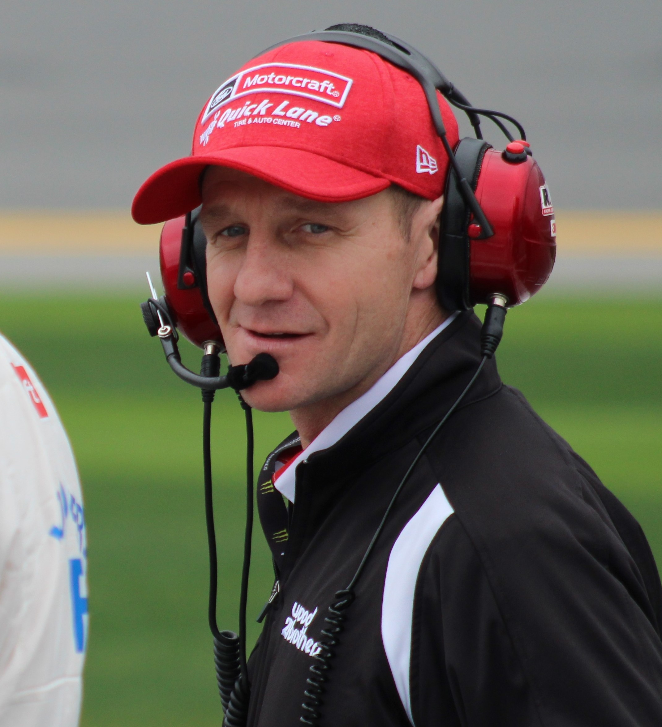 2019 Daytona 500